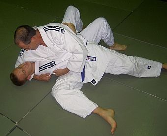 hon kesae